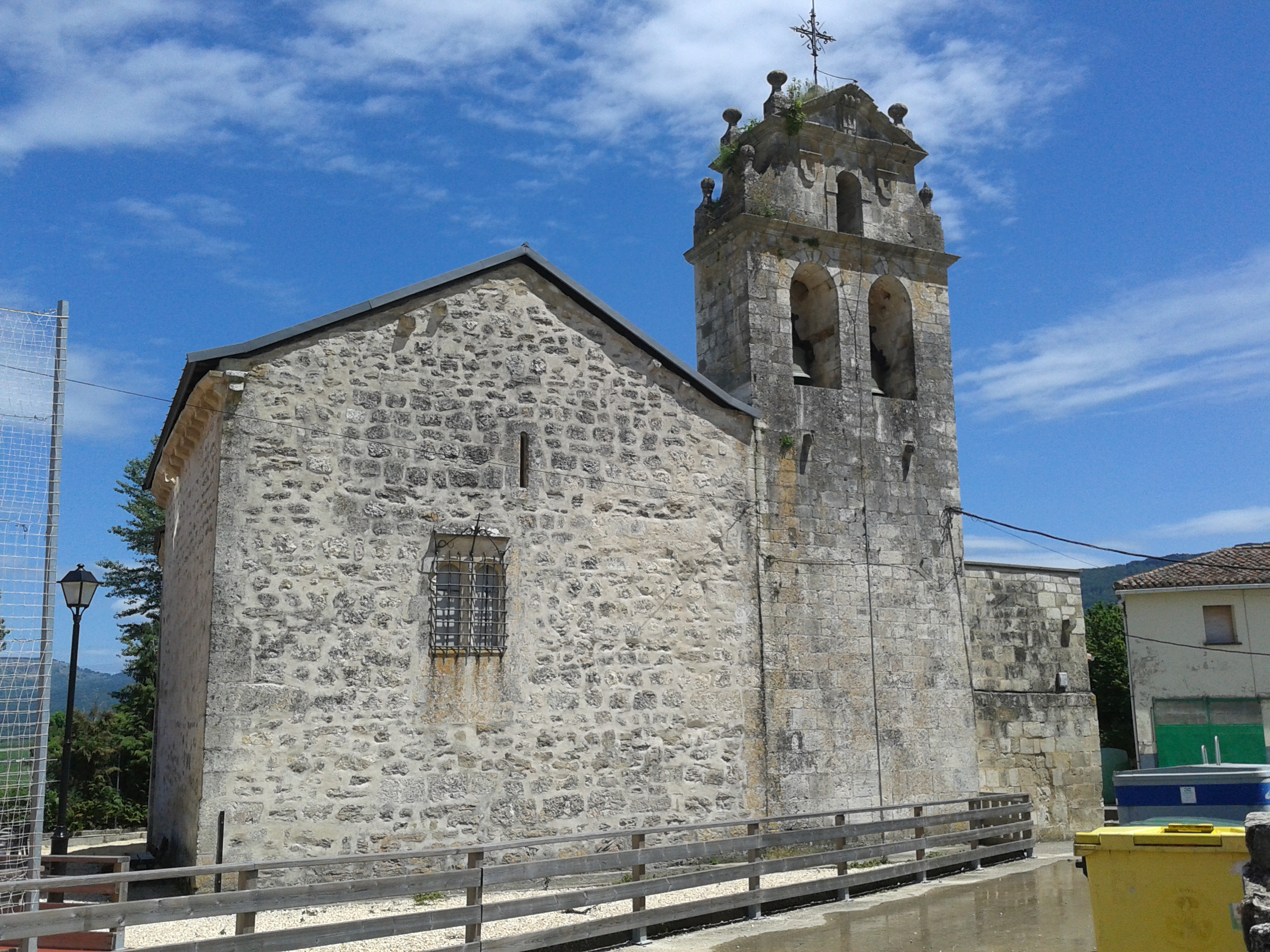 Alaitzako elizaren mendebaldeko fatxada